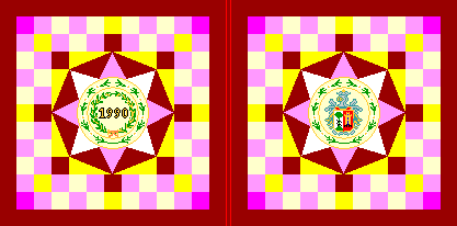 Bandera de Yurreta, en Vizcaya (España)